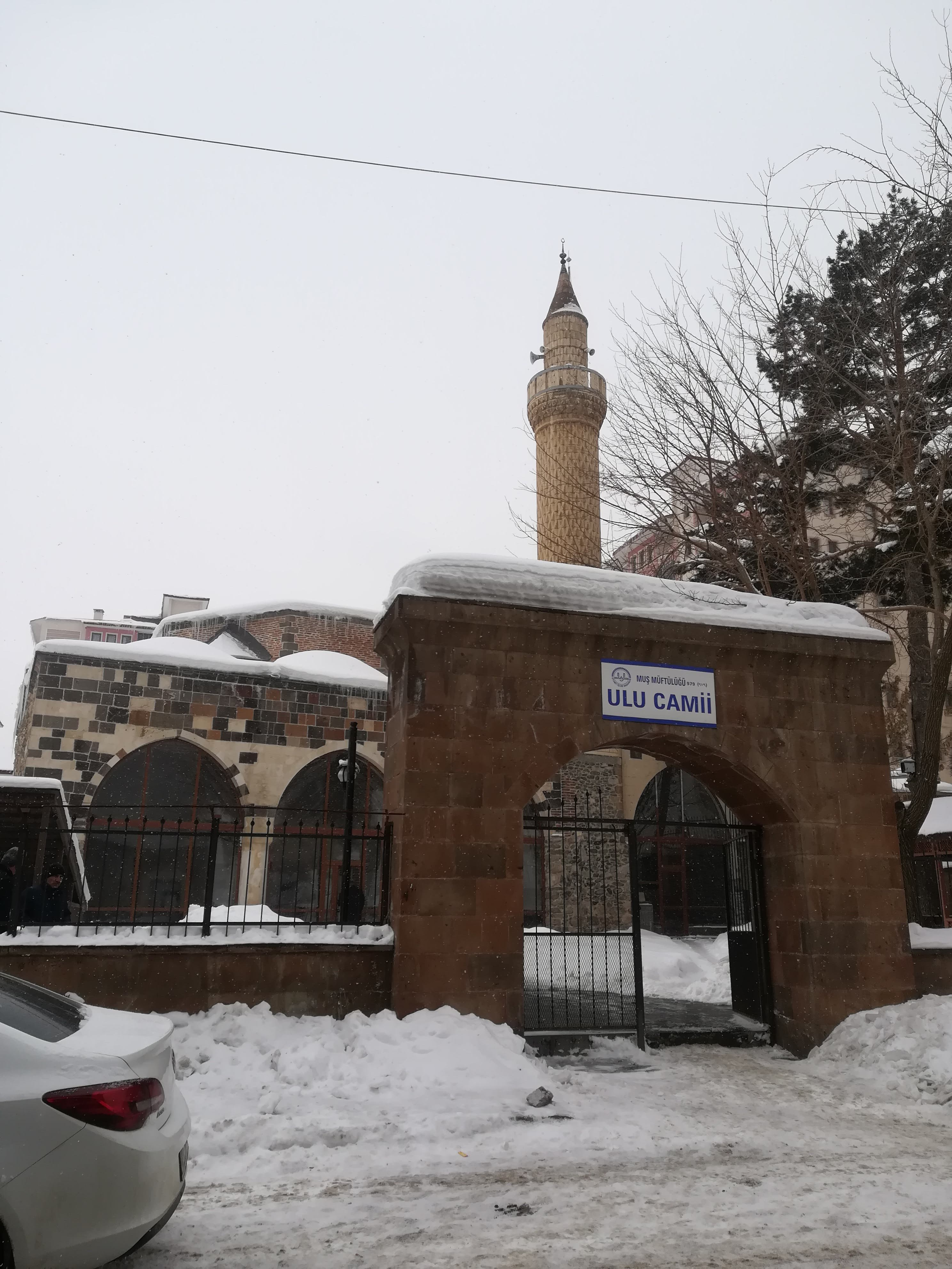 muş ulu cami